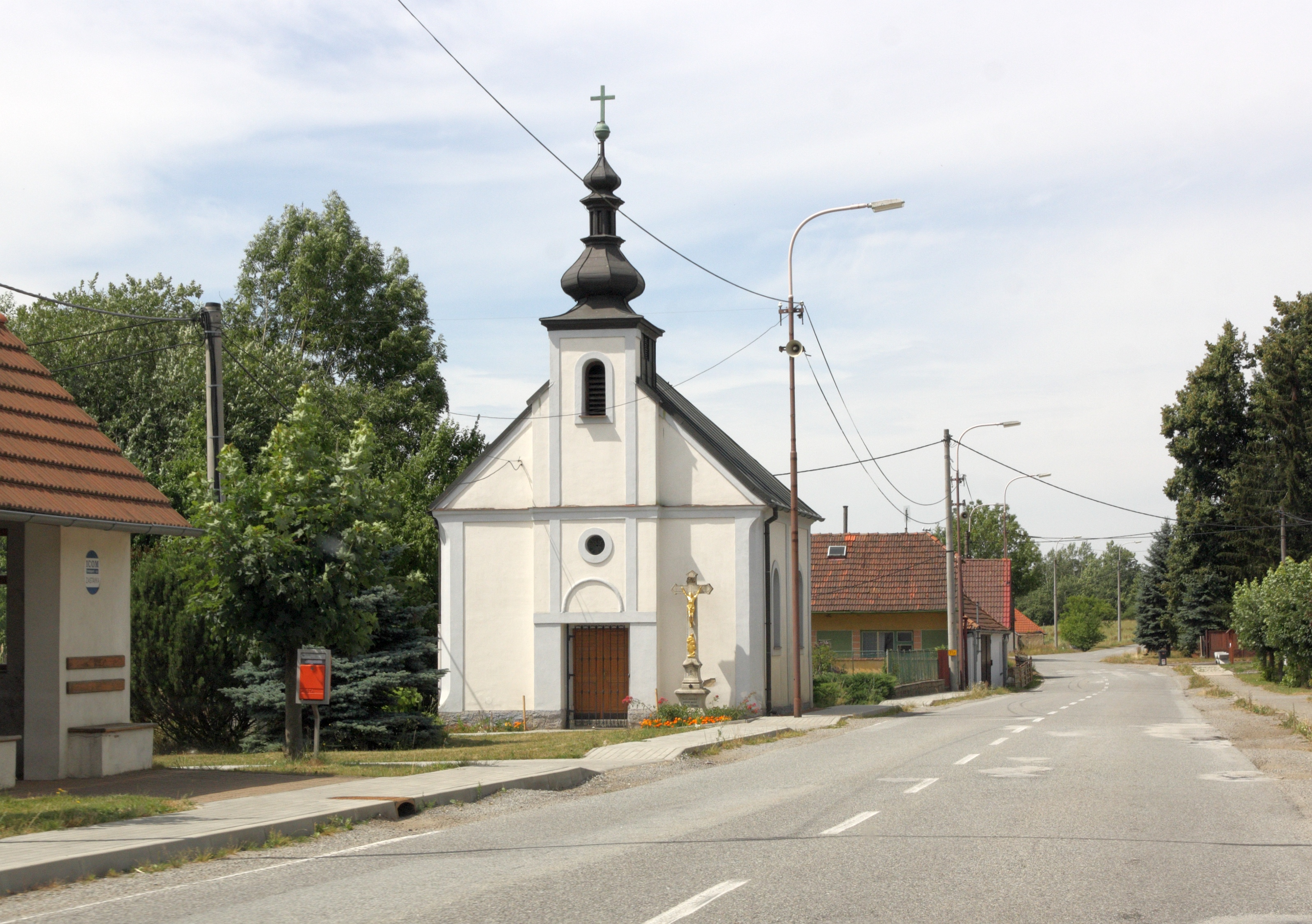 Olšany (okres Jihlava) - kaple Nejsvětějšího Srdce Páně.